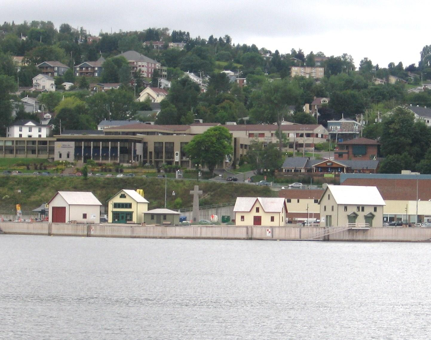 Vieux Gaspé à Gaspé